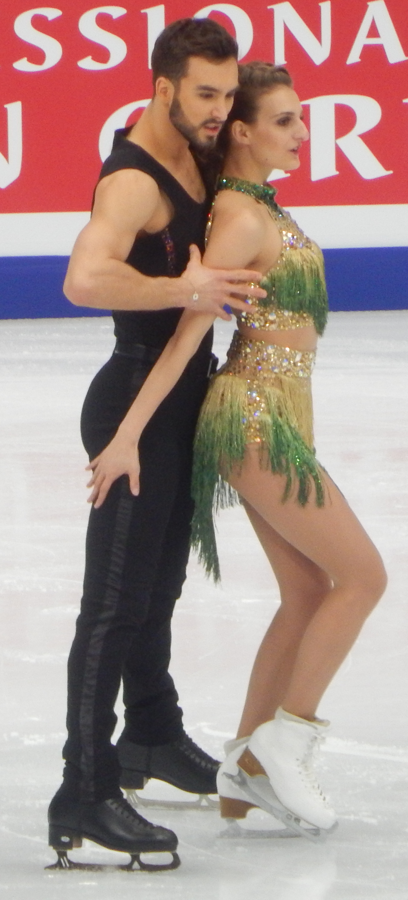 Чемпионат Европы по фигурному катанию 2018 в Москве. Третий день соревнований (19 января). Французская пара из Франции, победители в коротком танце, Габриэлла Пападакис и Гийом Сизерон